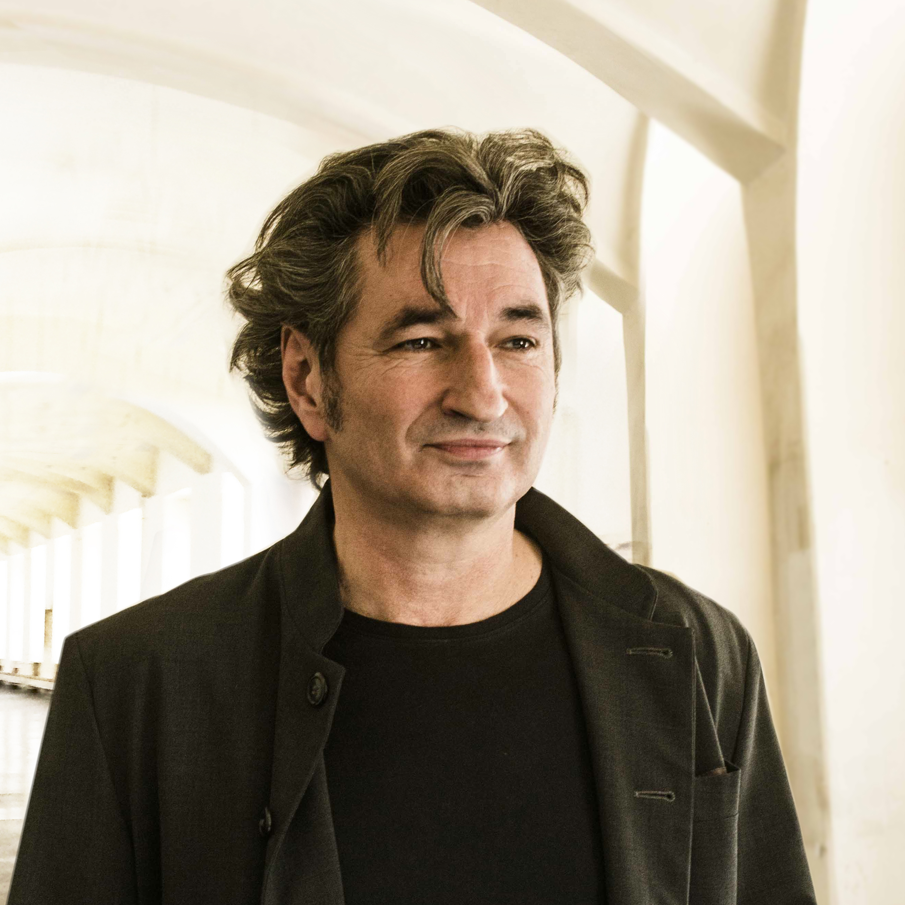 Andy Manndorff co. Sabine Hauswirth